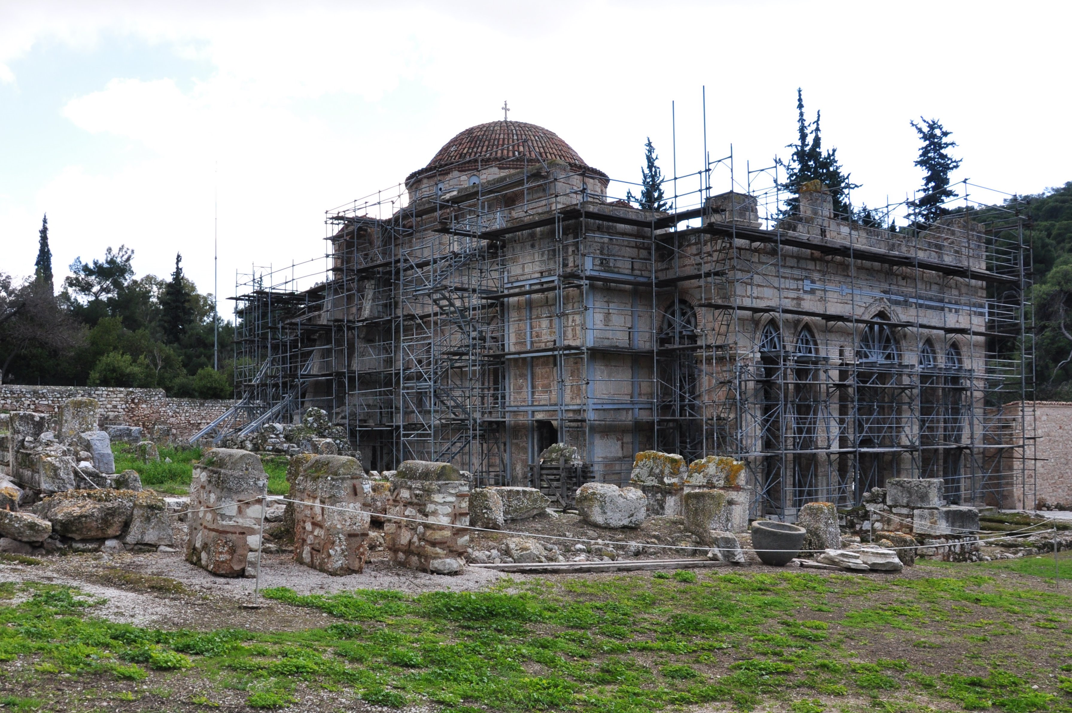 Widok świątyni od strony północno-zachodniej. Mamy styczeń 2011 - nie zakończono jeszcze prac zabezpieczających i konserwacyjnych, po trzęsieniu 1999r.